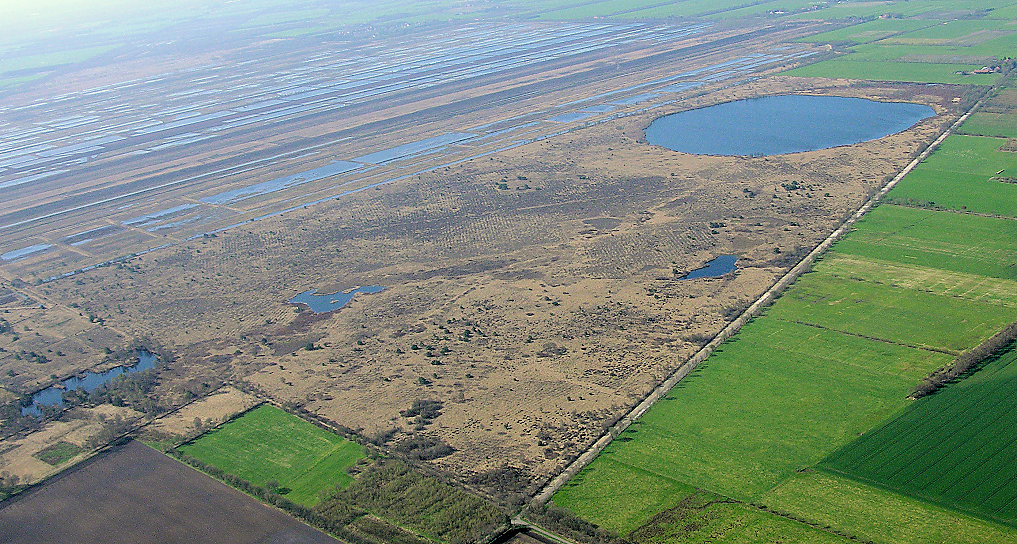 Nature Reserve Lengener Meer, East Frisia, Germany - Naturschutzgebiet Lengener Meer, Ostfriesland, Luftbild